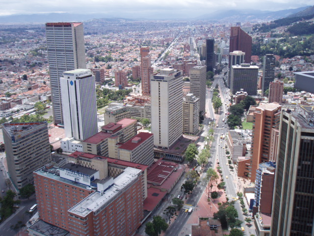 Esta es la vista del C Internacional desde la Torre Colpatria